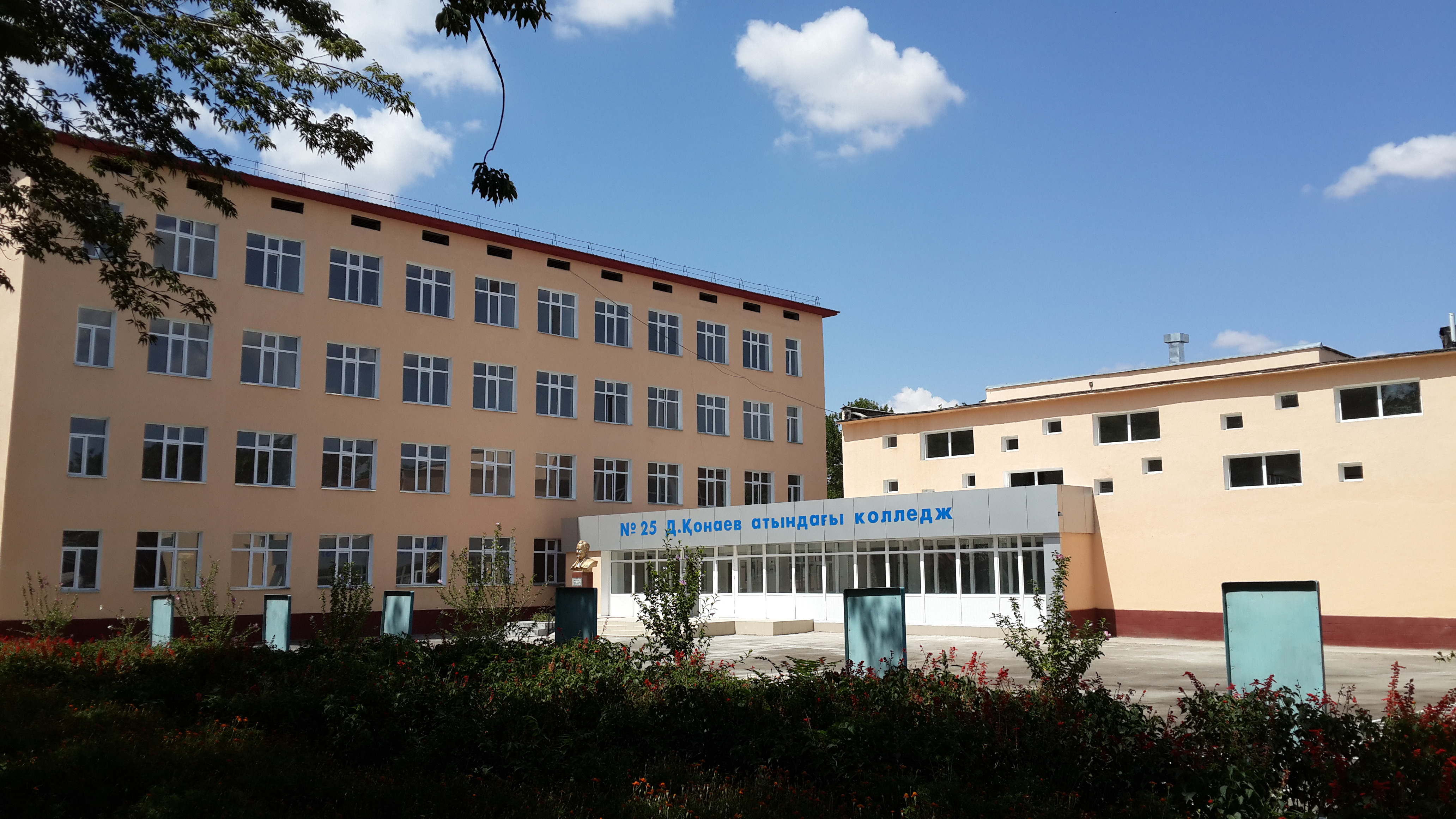 Oʻzbekcha/ўзбекча: Qorabuloq kolleji